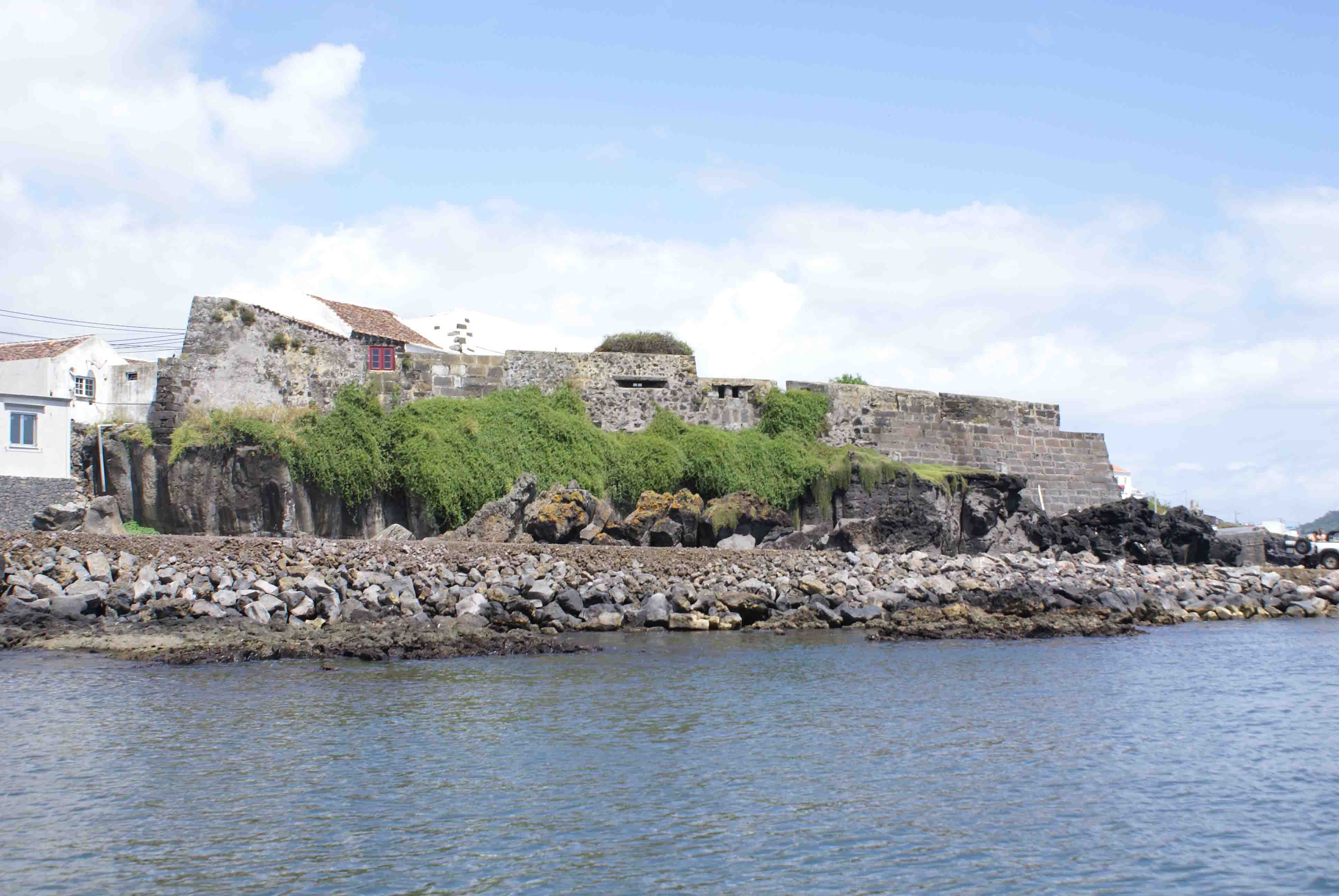 Forte Grande de São Mateus da Calheta visto pela costa, ilha Terceira, Açores, Portugal.